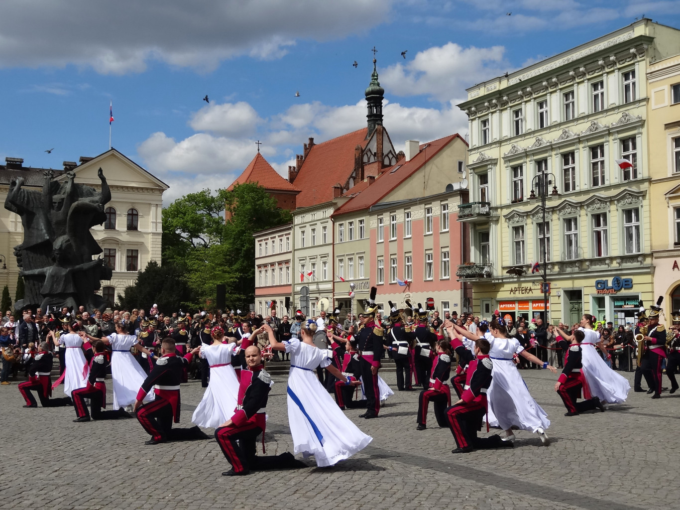 Święto Konstytucji 3 Maja 2014 roku na Starym Rynku w Bydgoszczy z udziałem orkiestry wojskowej garnizonu bydgoskiego oraz Zespołu Pieśni i Tańca Ziemia Bydgoska